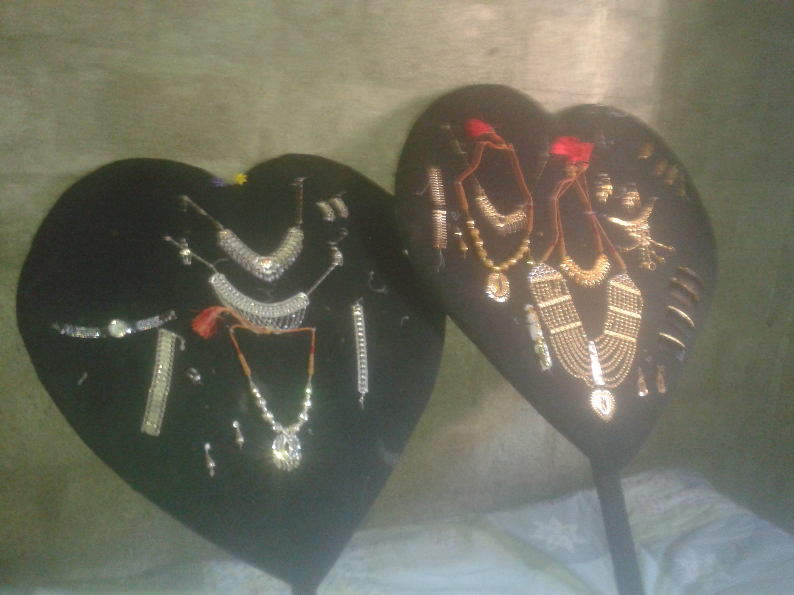 Bijoux offert au mariée lors d'un grand mariage à Ngazidja (Grande Comore)